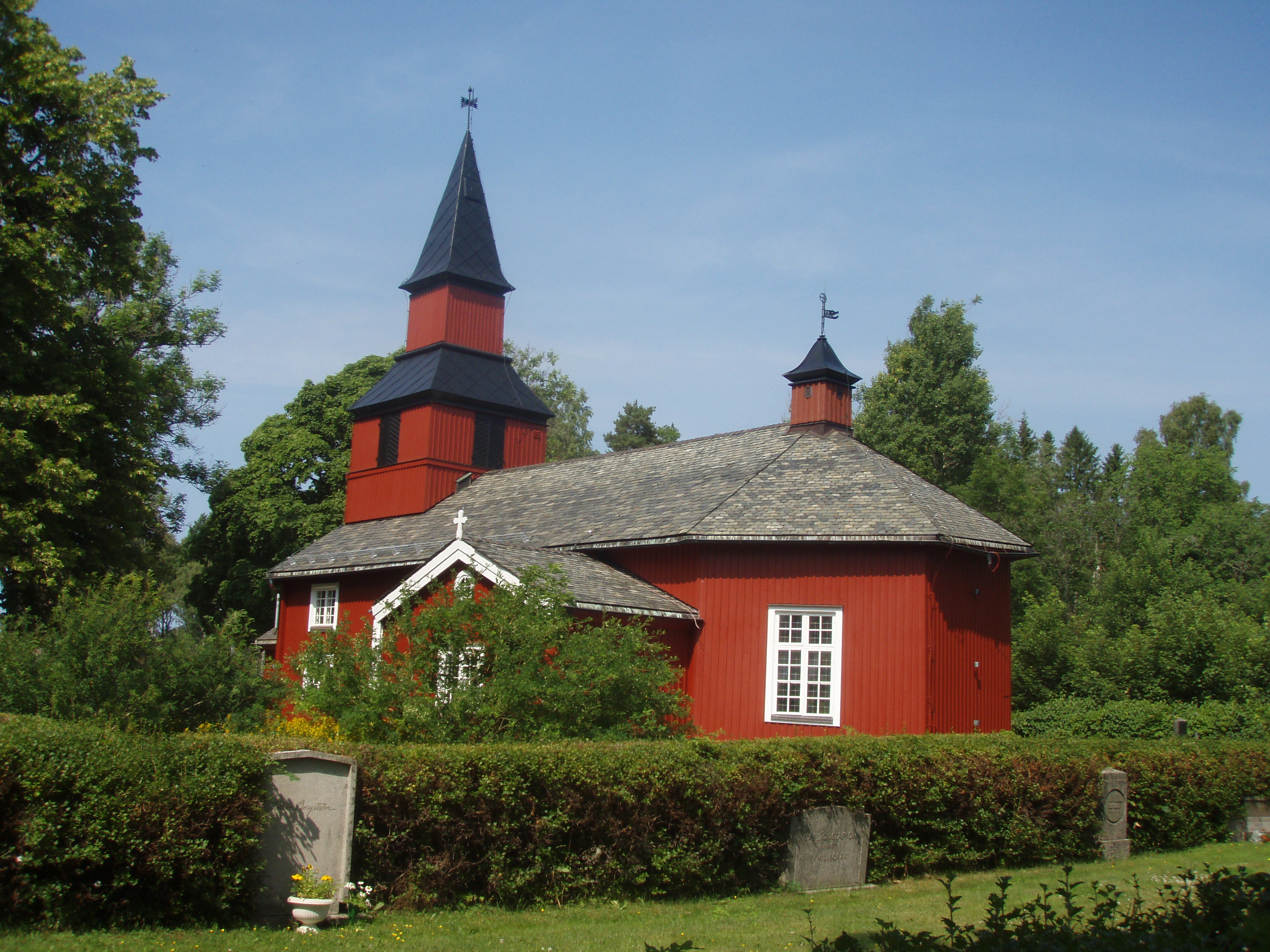 Bäcke kyrka (Vättungen 1:188)